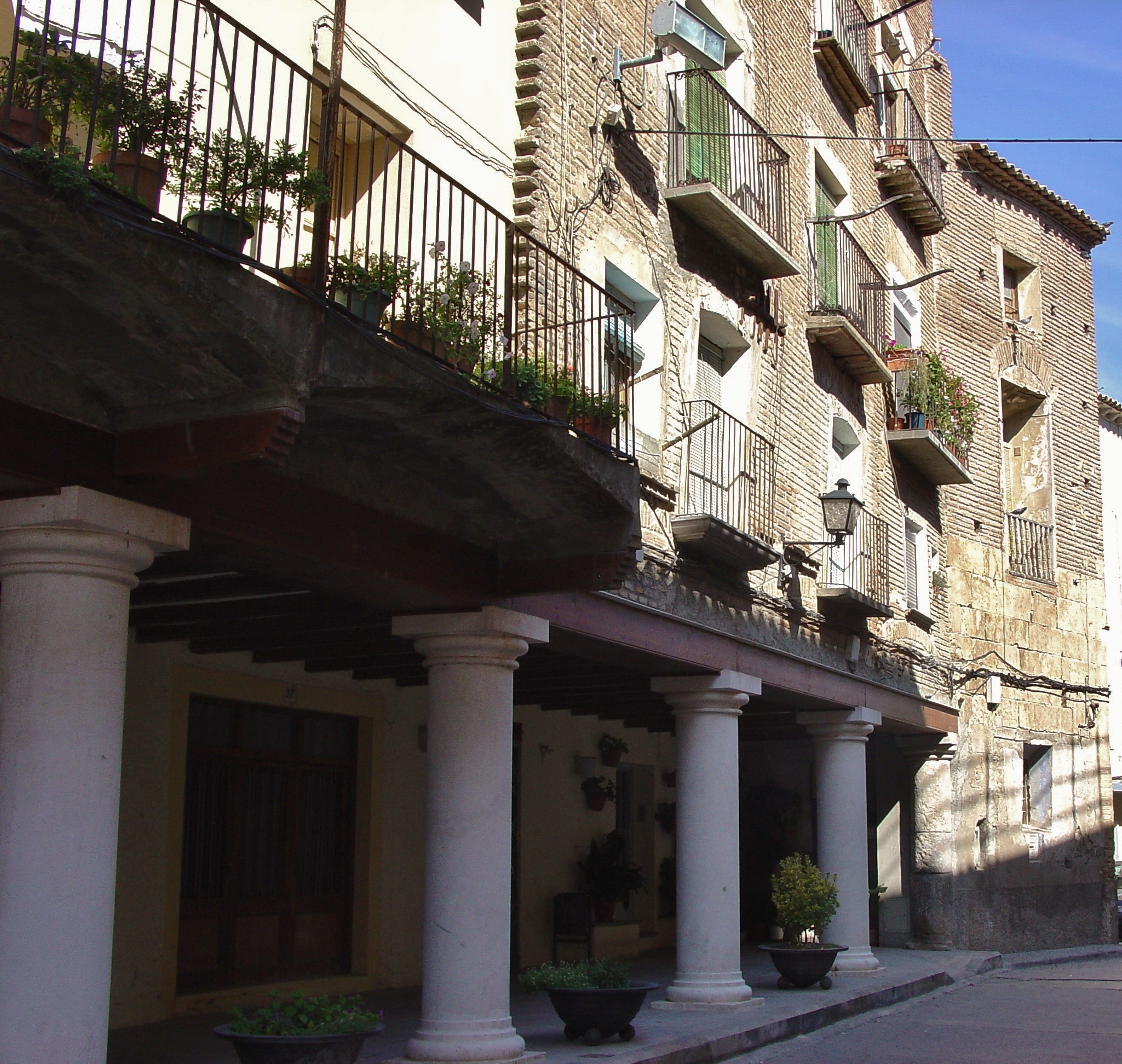 Plaza porticada del municipio oscense de Fonz